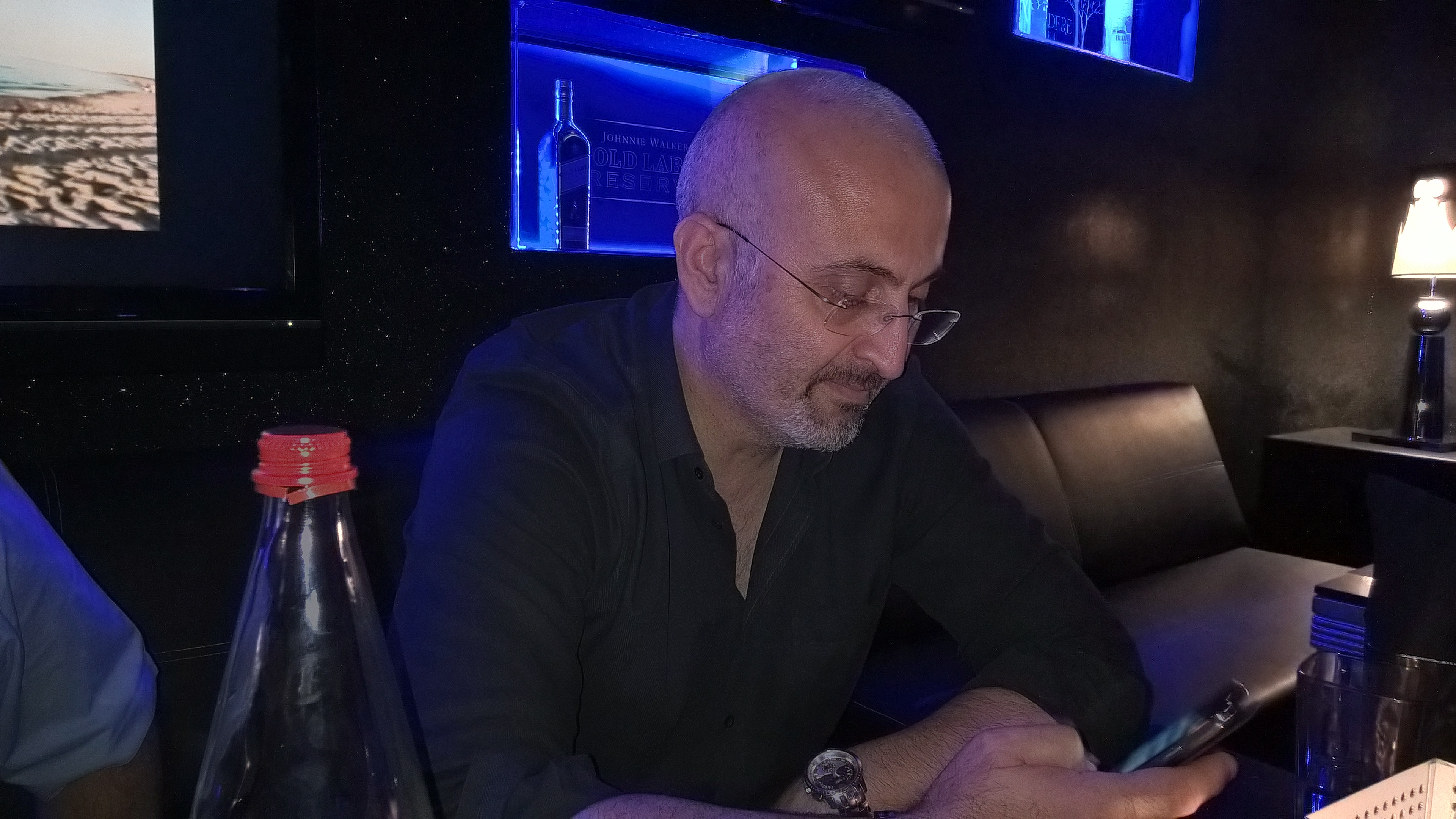 κουμΕττος κατσιολοΥδης